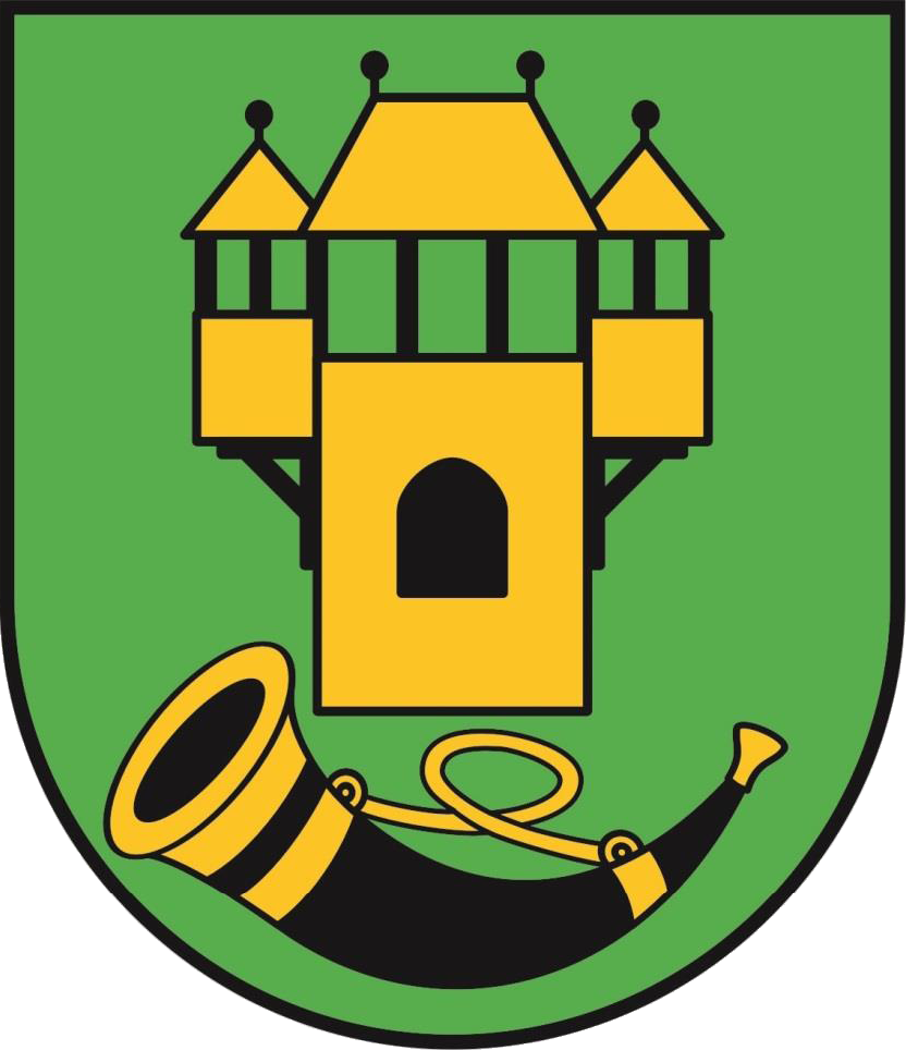 Herb gminy Rozogi